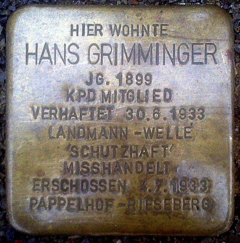 Braunschweig: Stolperstein für Hans Grimminger, einem Opfer der Rieseberg-Morde.